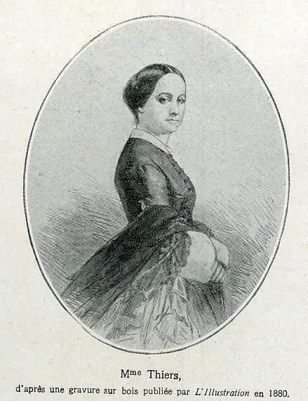 see picture